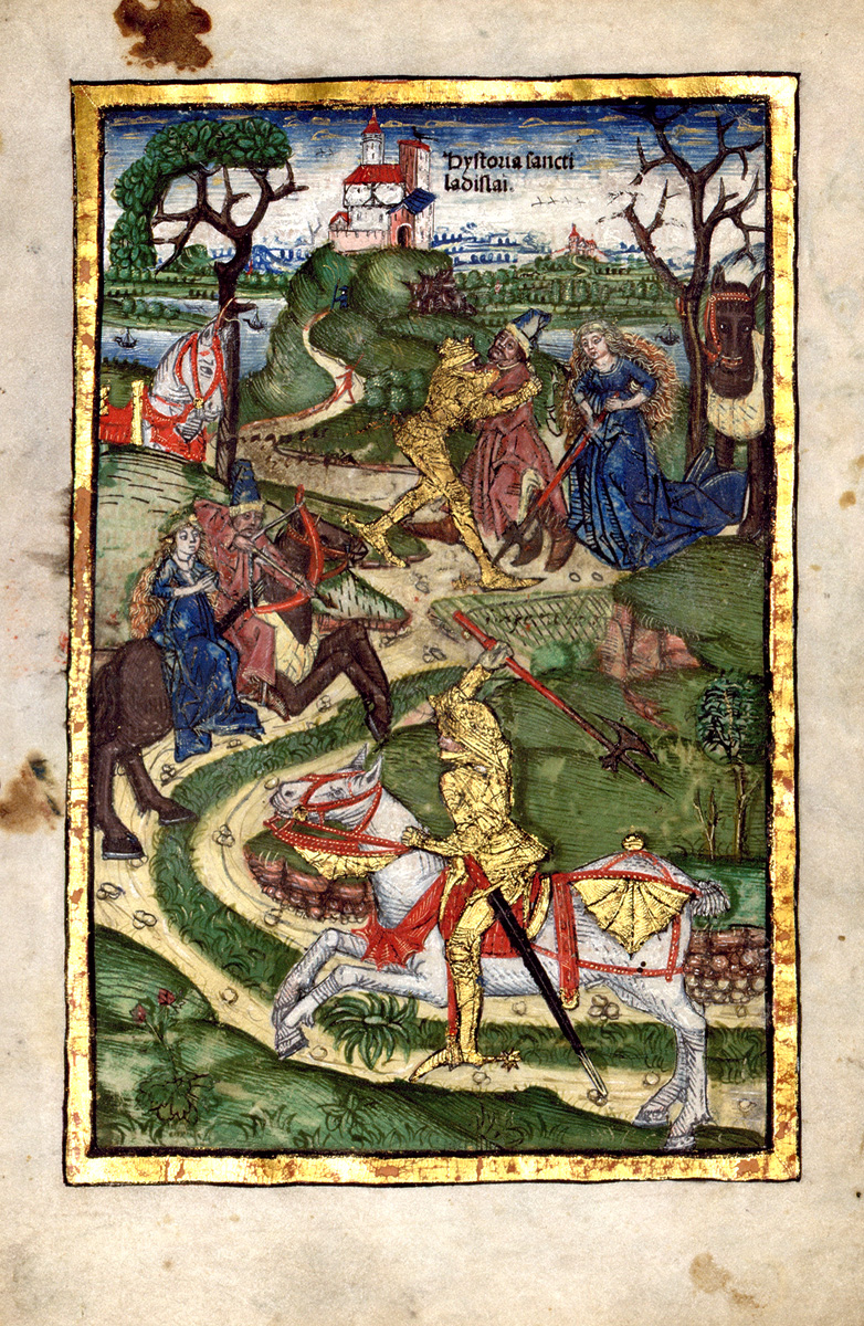 Thuróczy János krónikájának második lapja (1488)